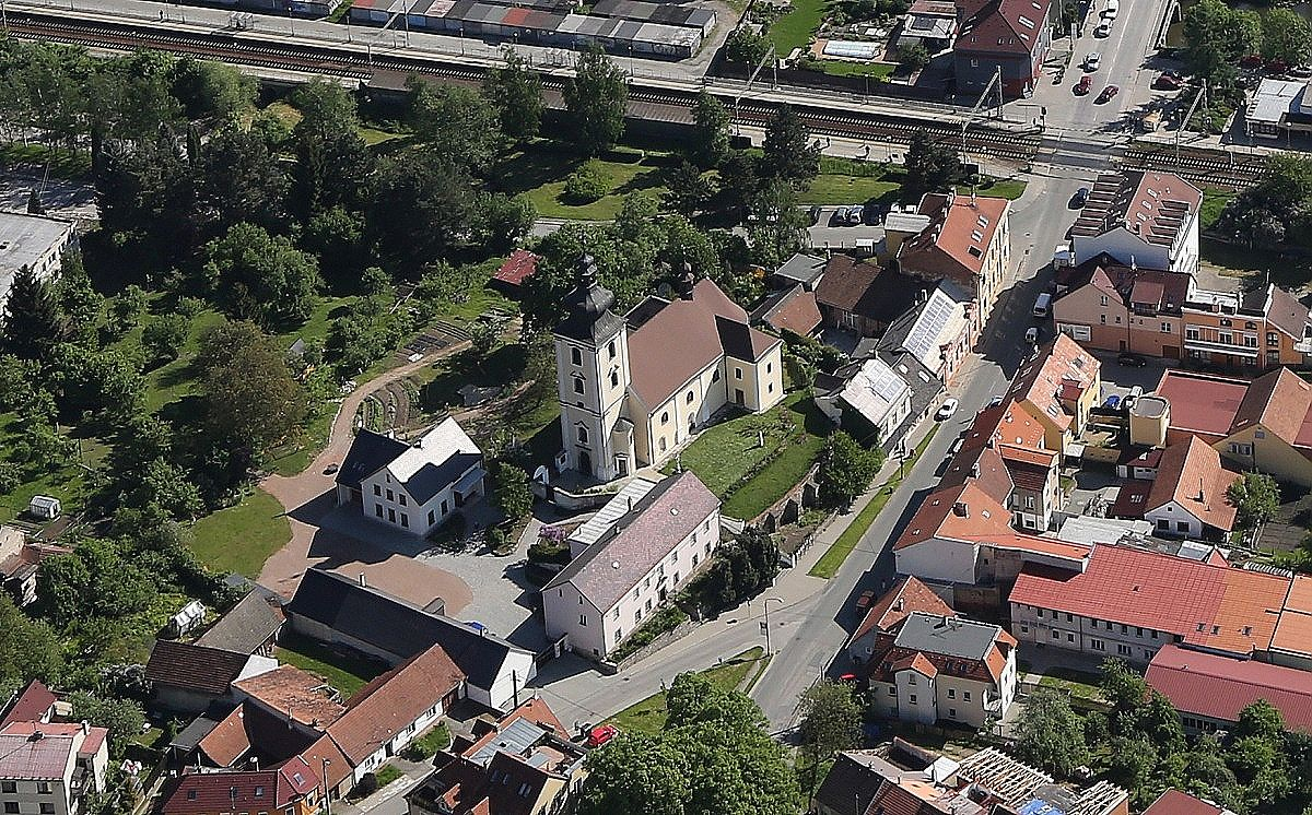 Barokní kostel svatého Martina v Blansku.